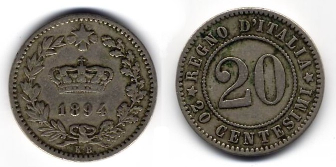 20 cent. coin of Kingdom of Italy 1894 Incisa da Filippo Speranza (1848-1903) la moneta, rappresentante come soggetto una corona, ha un diametro di 21 mm e un peso di 4 gr col bordo rigato. Realizzata in nichelio. Coniata presso la zecca di Berlino (vedere la sigla KB).